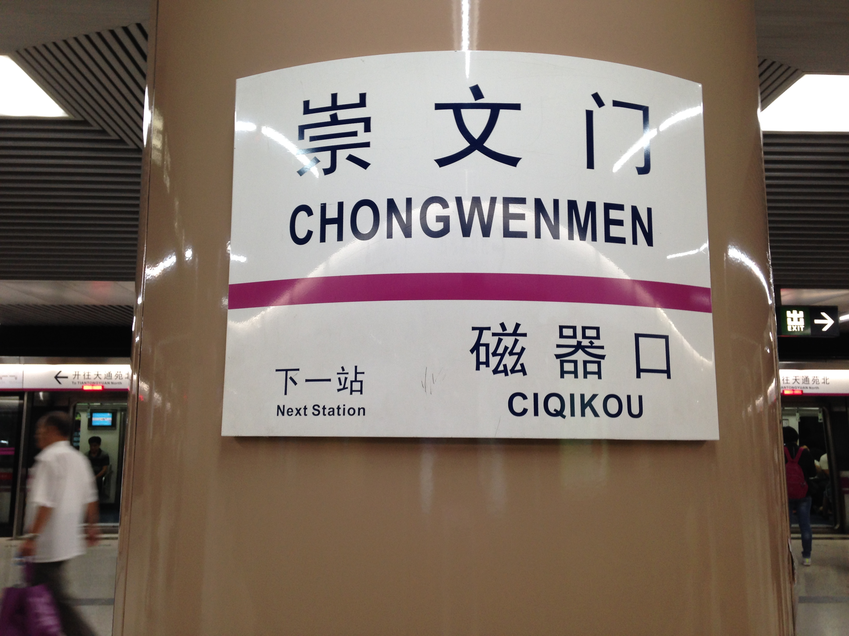 崇文門駅(北京地下鉄5号線)の駅名標